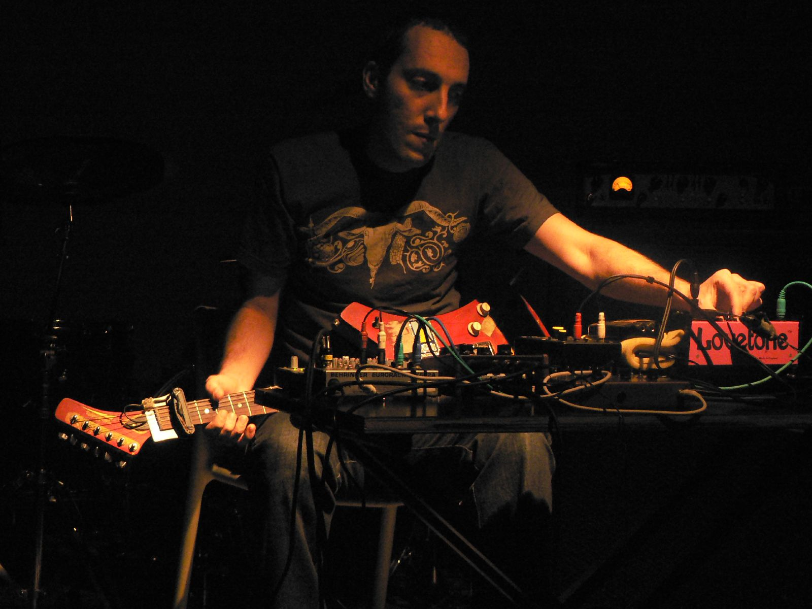 Oren Amabrchi, músico australiano de música ambiental.